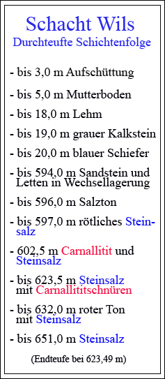 Die vom Schacht Wils durchteuften Gesteinsschichten